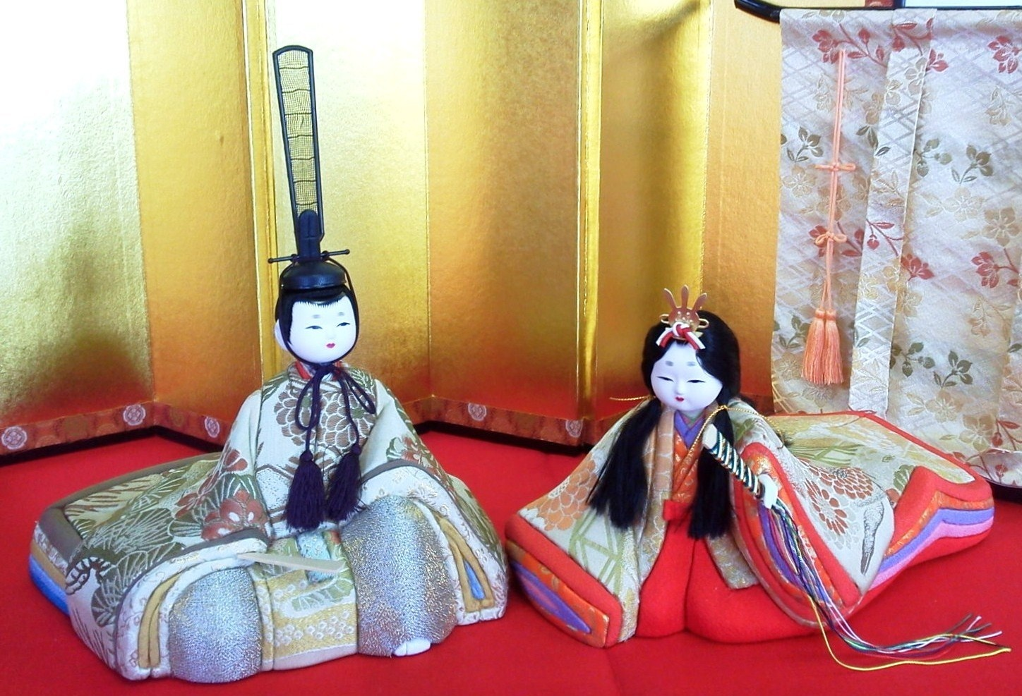 木目込み人形 ひな人形